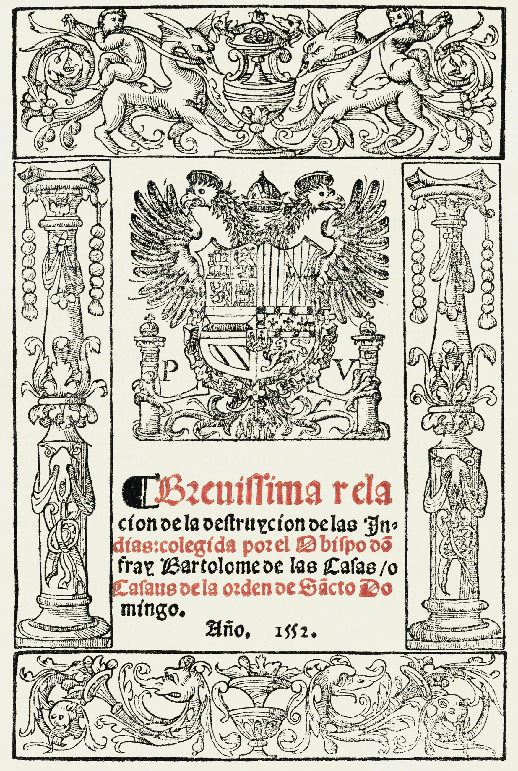 Portada del Brevisima relación de la destrucción de las Indias. Publicado en Sevilla en 1552 por Bartolomé de las Casas.